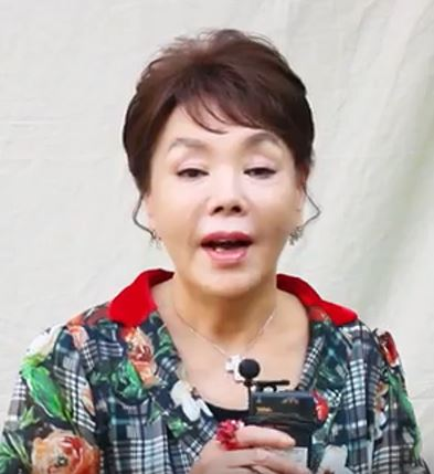 tvN 예능 '수미네 반찬'으로 맹활약중인 배우 김수미가 독자들에게 반가운 인사를 전합니다. '우먼센스' 8월호에서 그녀의 이야기를 확인하세요!